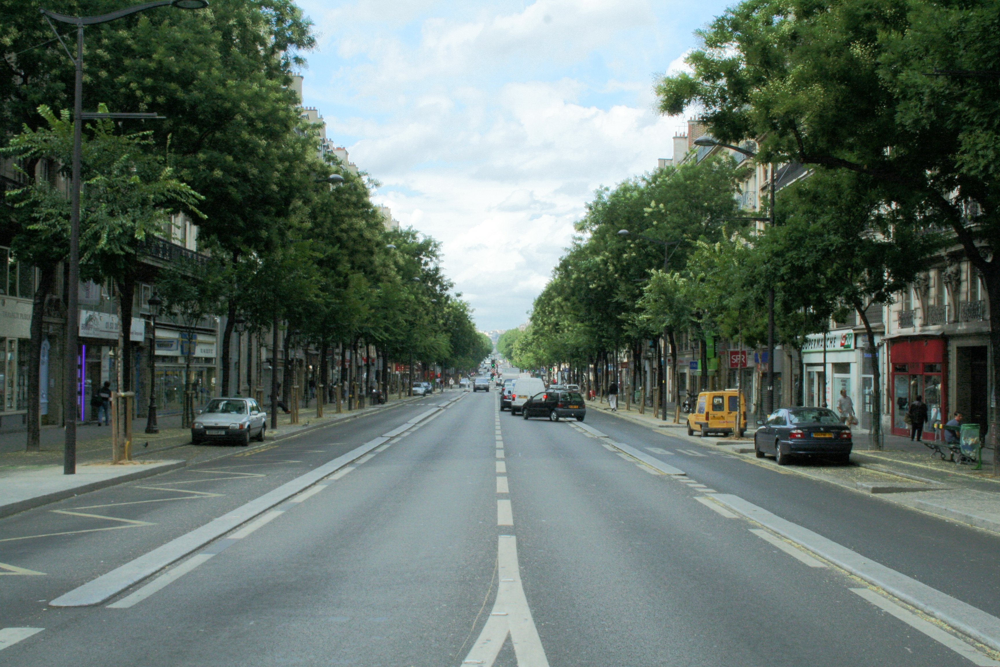 Photo du boulevard de Magenta (Paris 10).